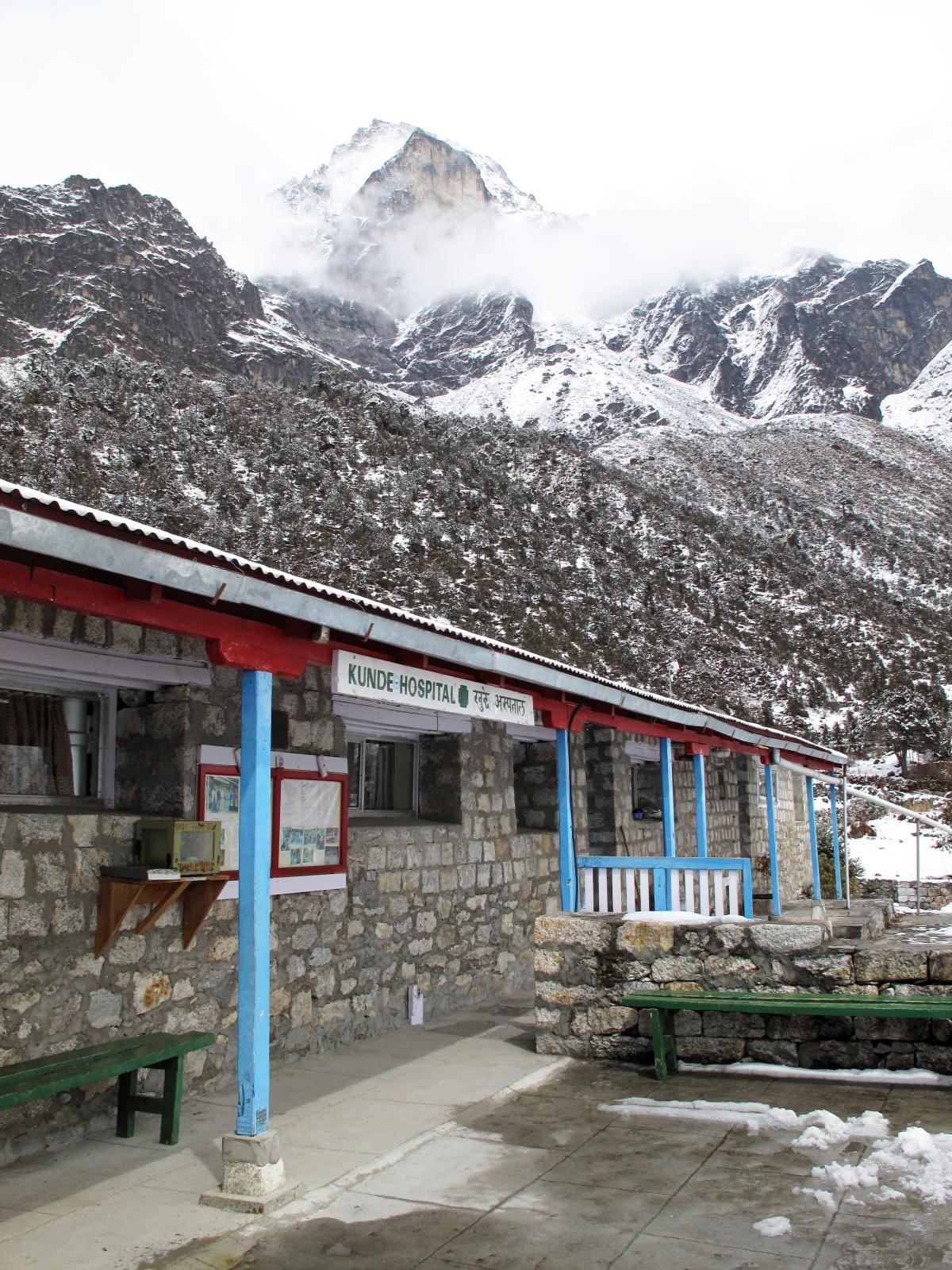 Kunde Hospital, Nepal